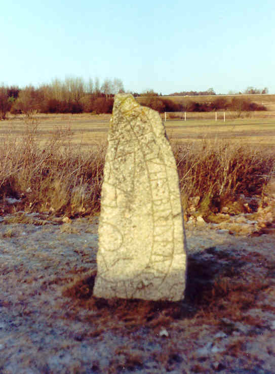 Runstenen Ög 62 vid St:a Ingrids kloster i Skänninge, våren 1997. En bild tagen av Harri Blomberg.